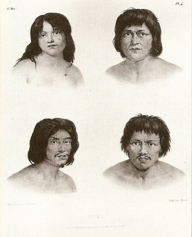 Puris, acima, e camacans, abaixo (litogravura, 22,3 x 19,5 cm)